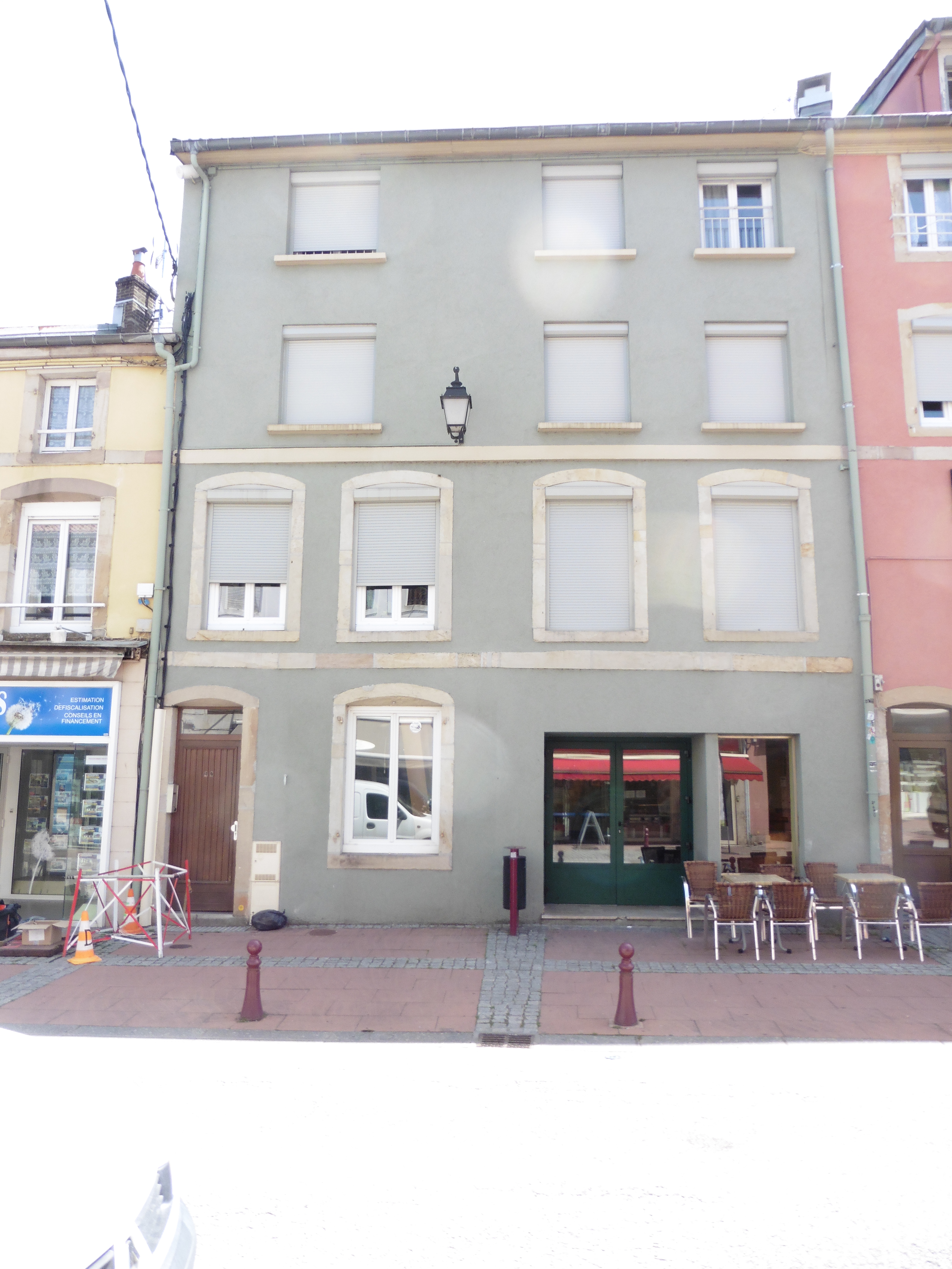 Photo de la façade